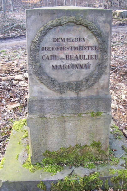 Inschrift: AM/25. NOVEMBER 1815//VIER EICHEN/ZUM GEDAECHTNISS/DER FUNFZIGJÄHRIGEN/DIENSTZEIT//GEPFLANZT/VON DEM/KLOSTER-FORSTAMTE/MARIENRODE//DEM/HERREN/OBER-FORSTMEISTER/CARL VON BEAULIEU MARCONNY